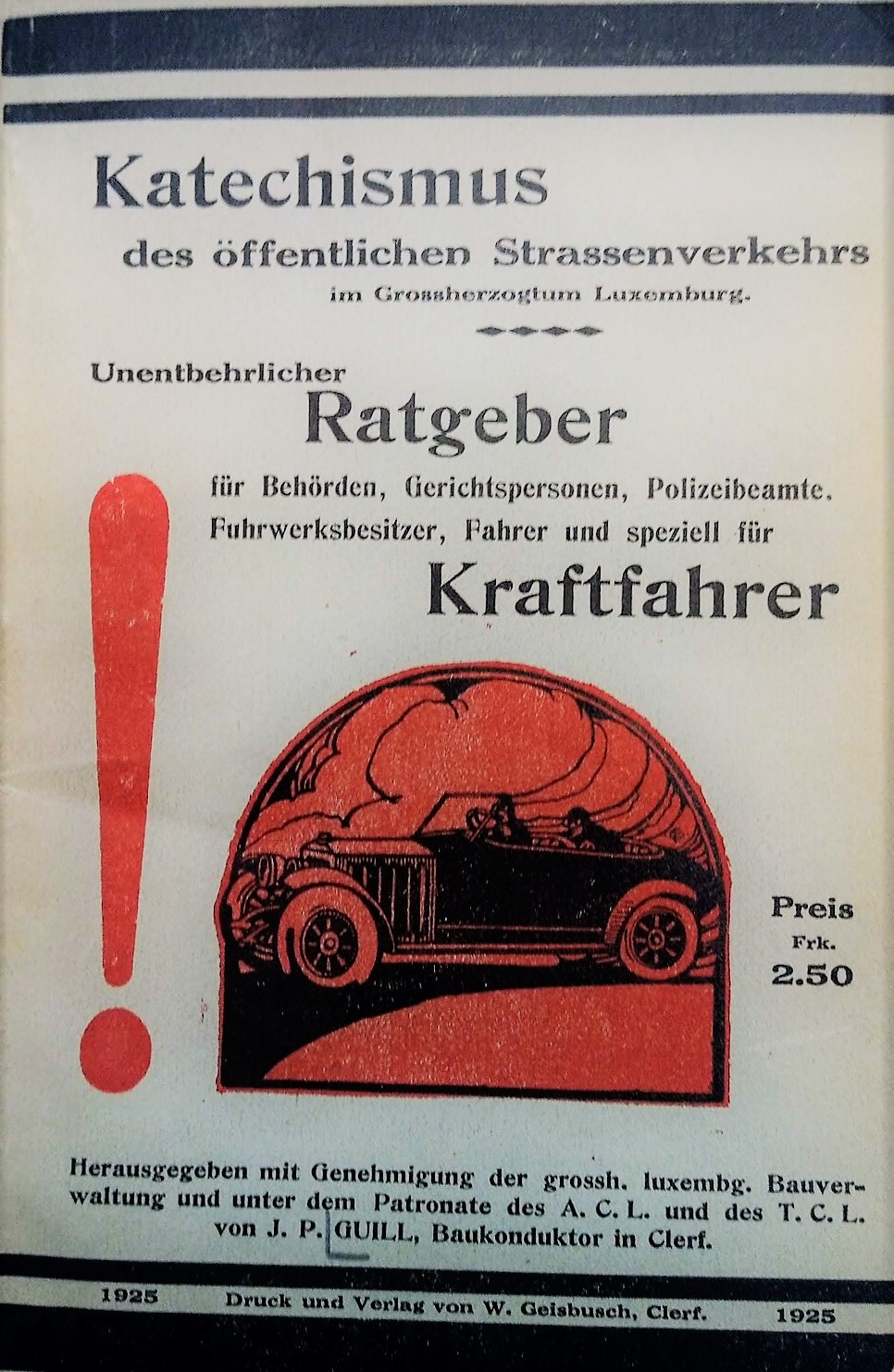 Katechismus des öffentlichen Strassenverkehrs im Grossherzogtum Luxemburg : Unentbehrlicher Ratgeber für Behörden, Gerichtspersonen, Polizeibeamte, Fuhrwerkbesitzer, Fahrer und speziell für Kraftfahrer / hrsg. von Jean-Pierre Guill. 1925. Druck und Verlag: W. Geisbusch, Clerf.